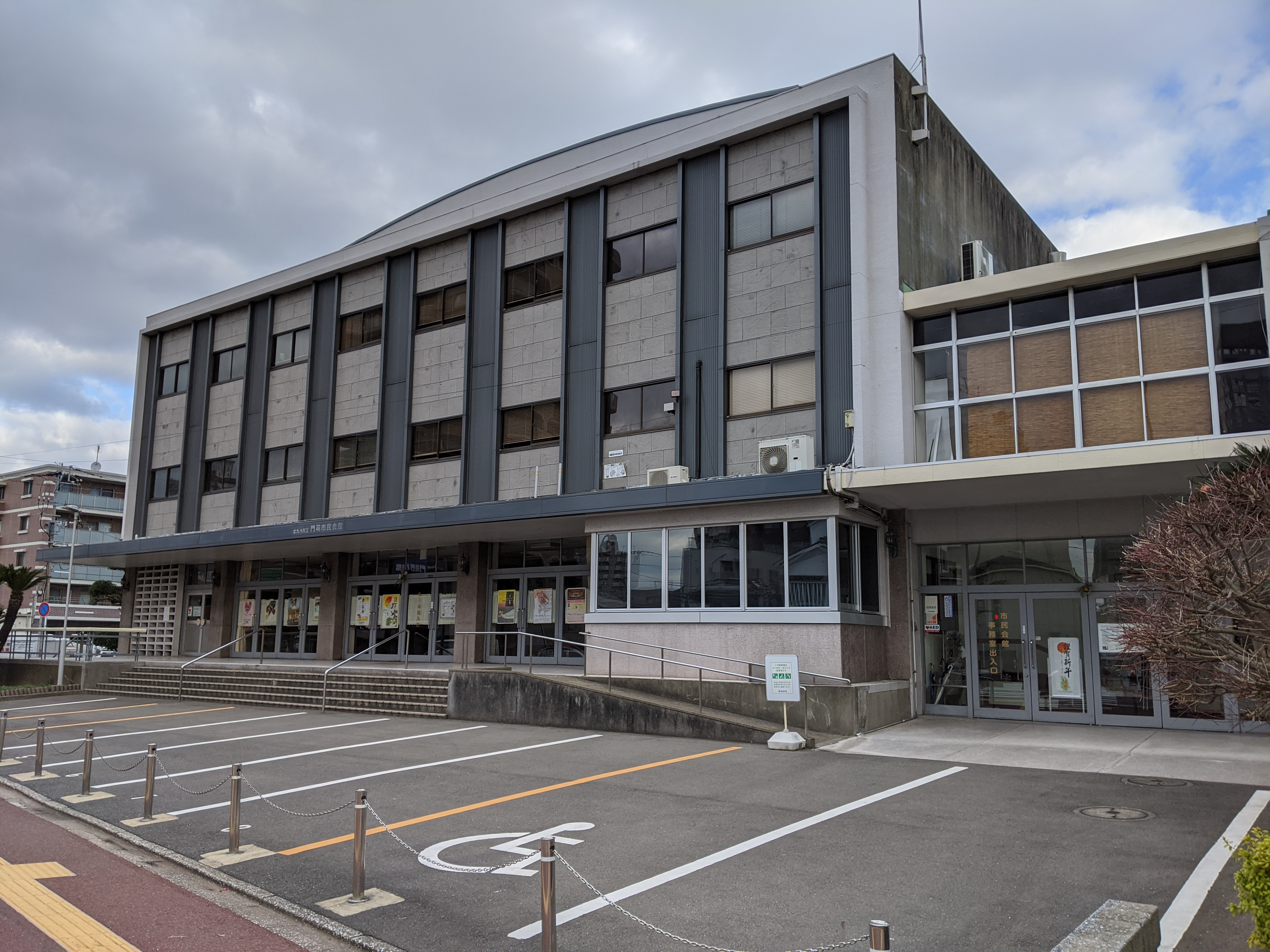 門司市民会館（北九州市門司区）